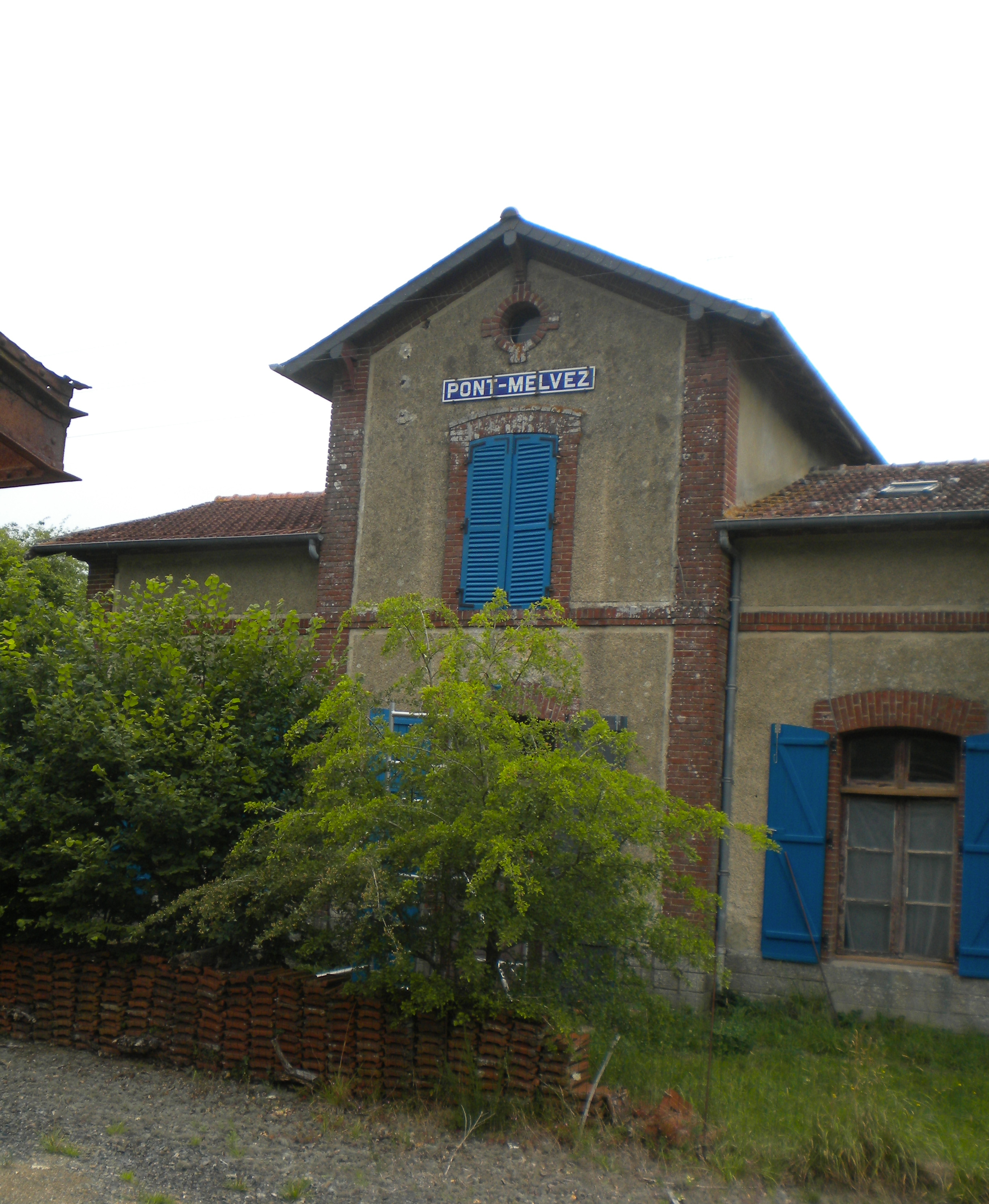 Ti-gar Pont-Melvez